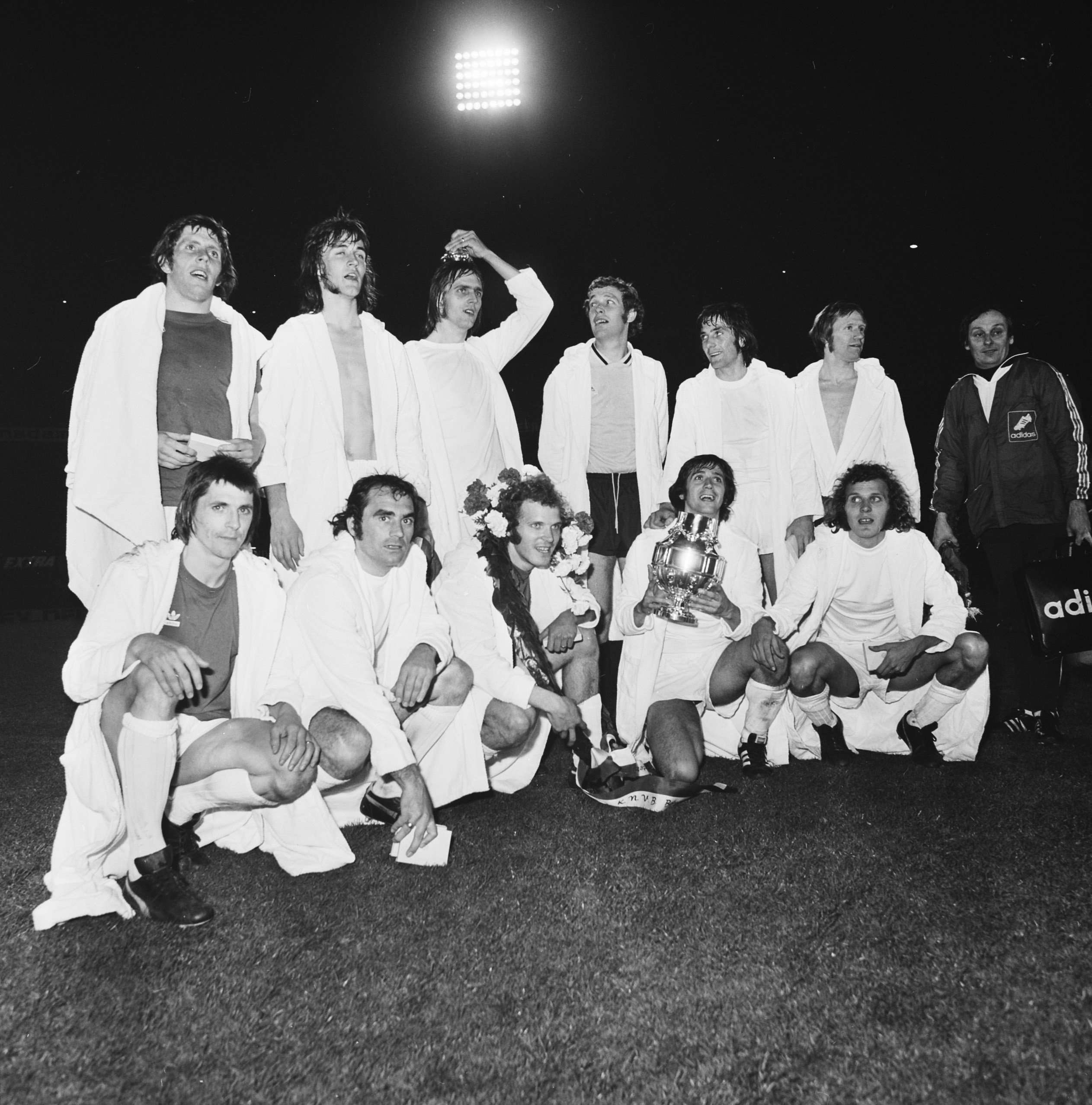 Collectie / Archief : Fotocollectie Anefo Reportage / Serie : [ onbekend ] Beschrijving : KNVB bekerfinale PSV tegen NAC 6-0, PSV-elftal poserend met de beker Datum : 1 mei 1974 Trefwoorden : bekers, sport, voetbal Instellingsnaam : KNVB, NAC, PSV Fotograaf : Mieremet, Rob / Anefo Auteursrechthebbende : Nationaal Archief Materiaalsoort : Negatief (zwart/wit) Nummer archiefinventaris : bekijk toegang 2.24.01.03 Bestanddeelnummer : 927-1629